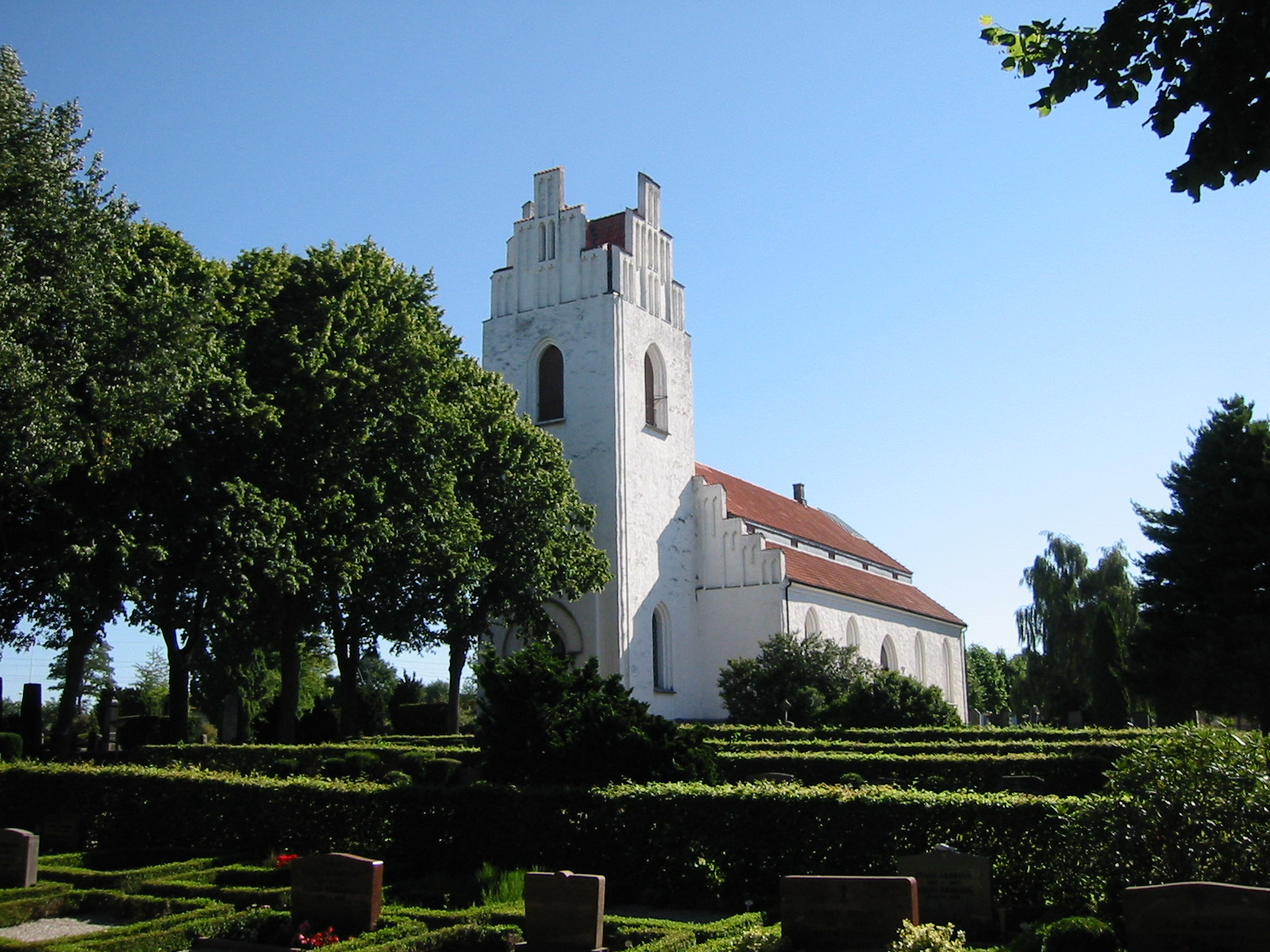 Billeberga kyrka.